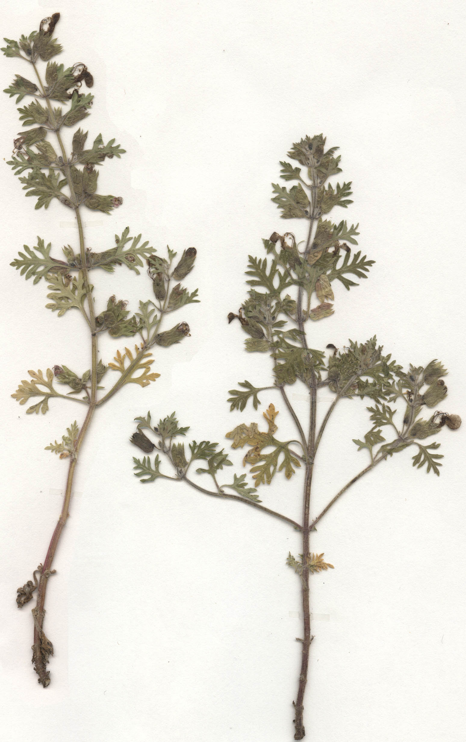 Teucrium botrys, eigener Herbarbeleg von 1987, Unterfranken